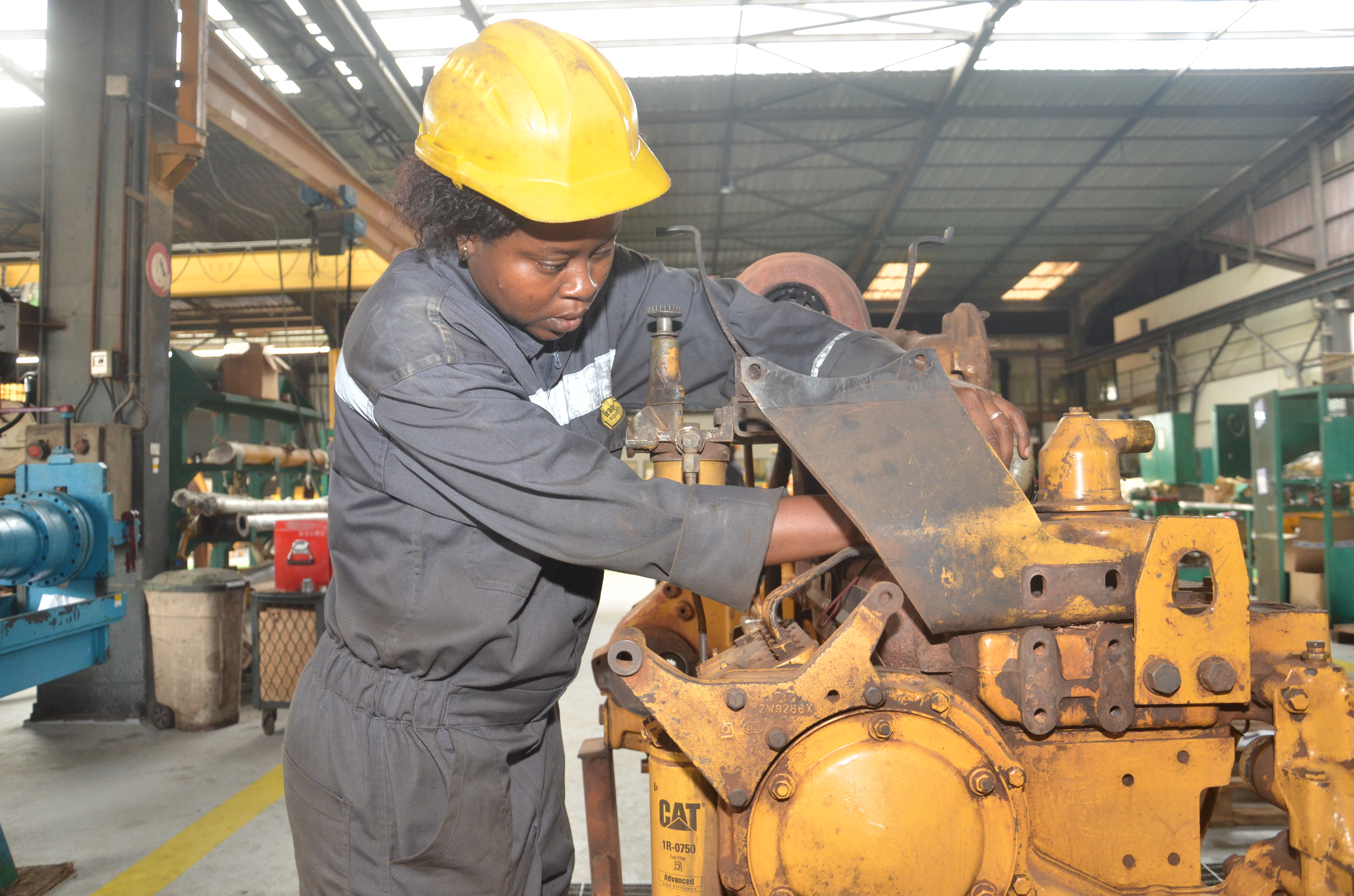 Femme mécanicienne d'engins lourds dans une entreprise située à Douala